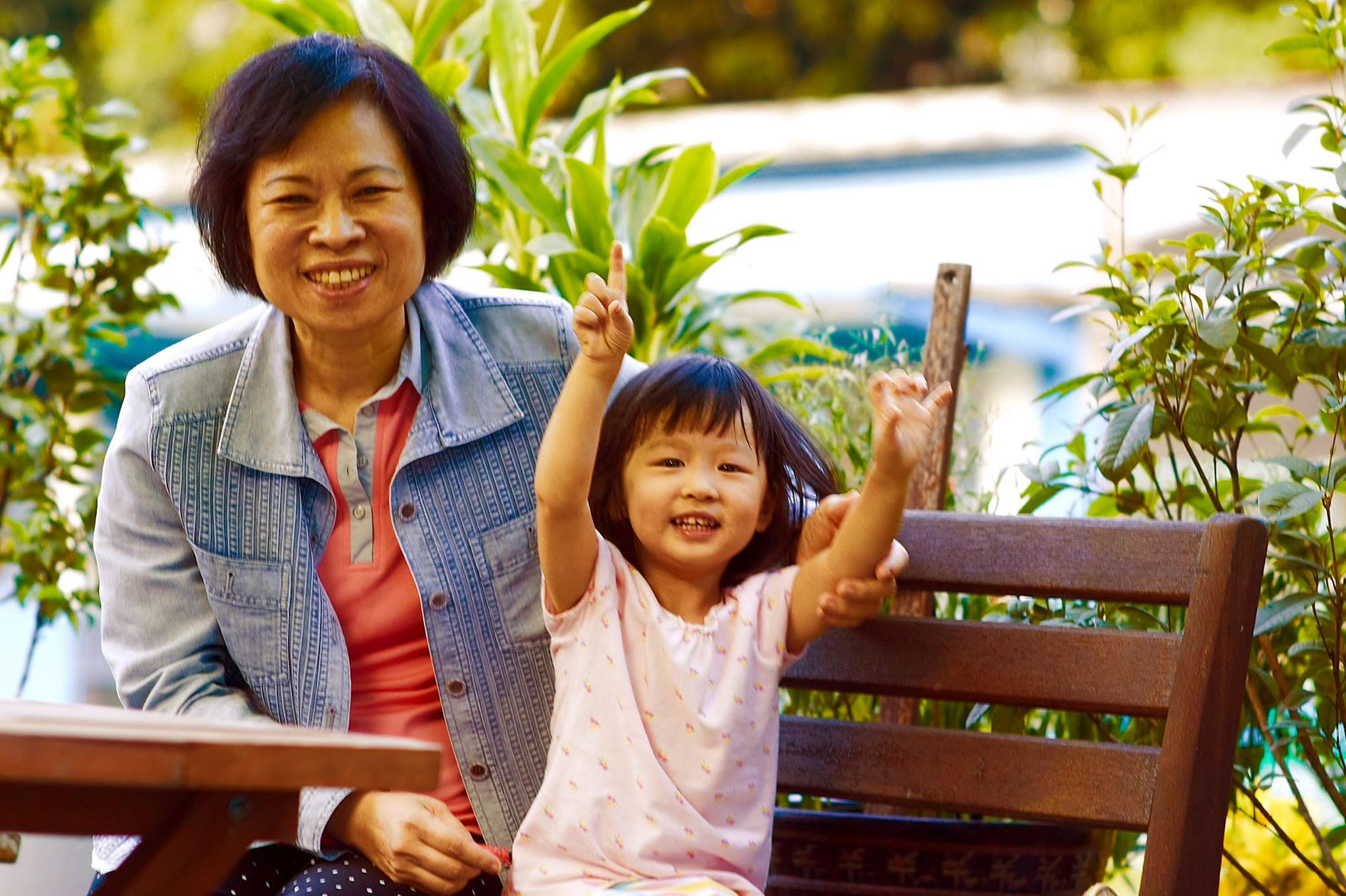 母親和其孫女的合照